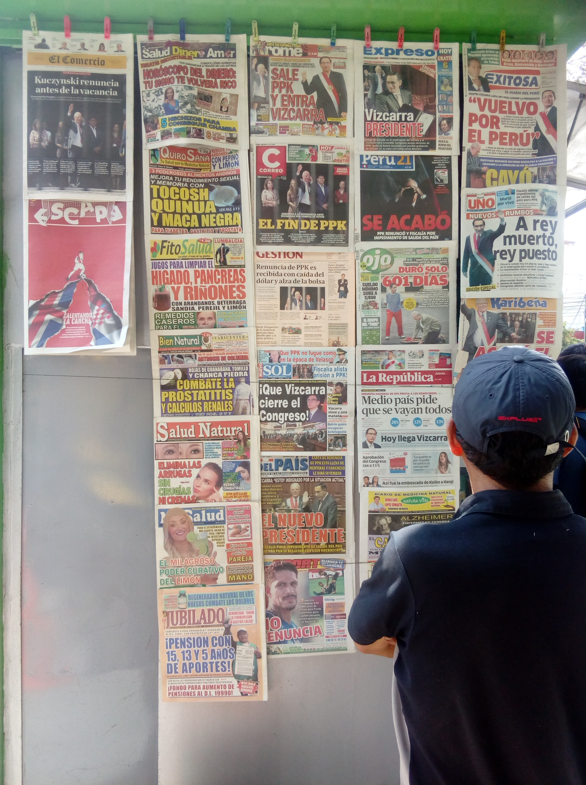 Un quiosco en Lima con los periódicos mostrando en primera plana la noticia de la renuncia de Pedro Pablo Kuczynski al cargo presidencial.